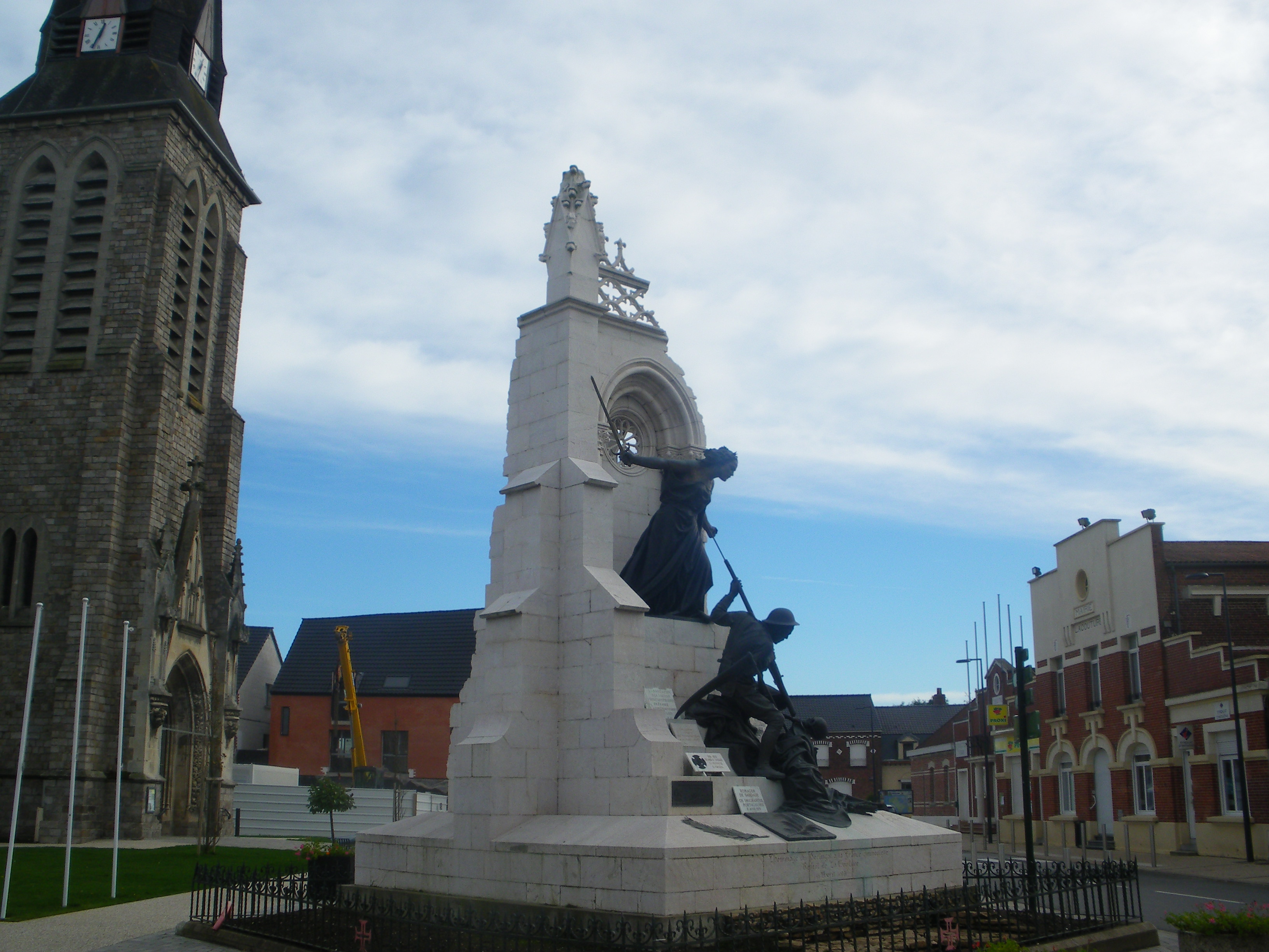 De gauche à droite : l'église, le monument en hommage aux combattants portugais de la première guerre mondiale et la mairie.